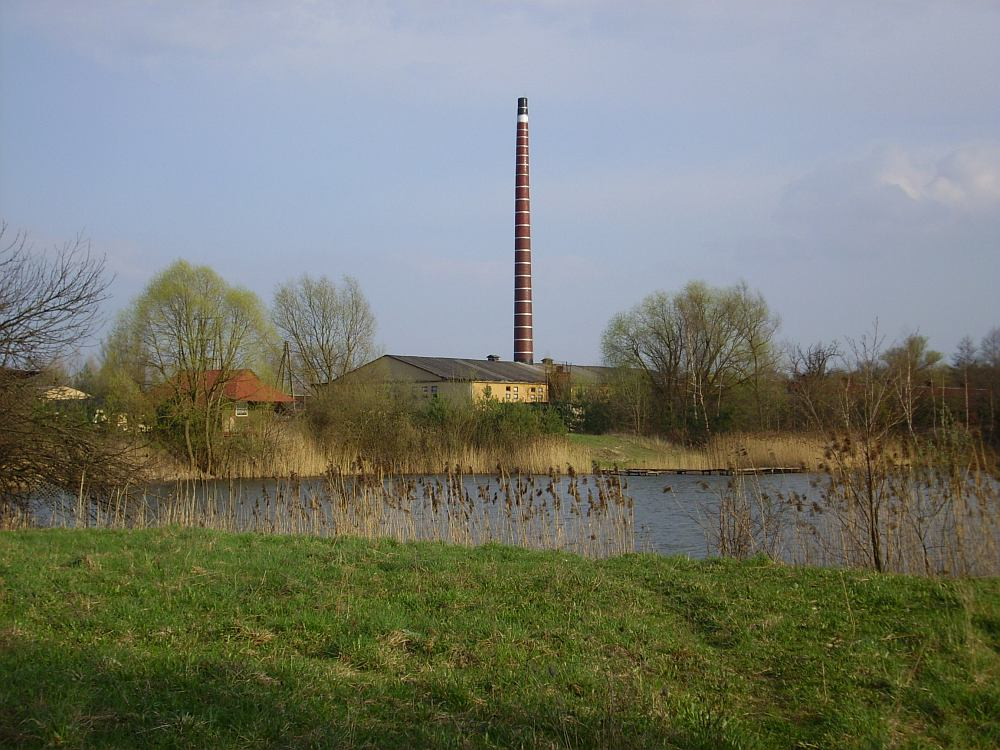 Chotyłów. Glinianki i cegielnia.